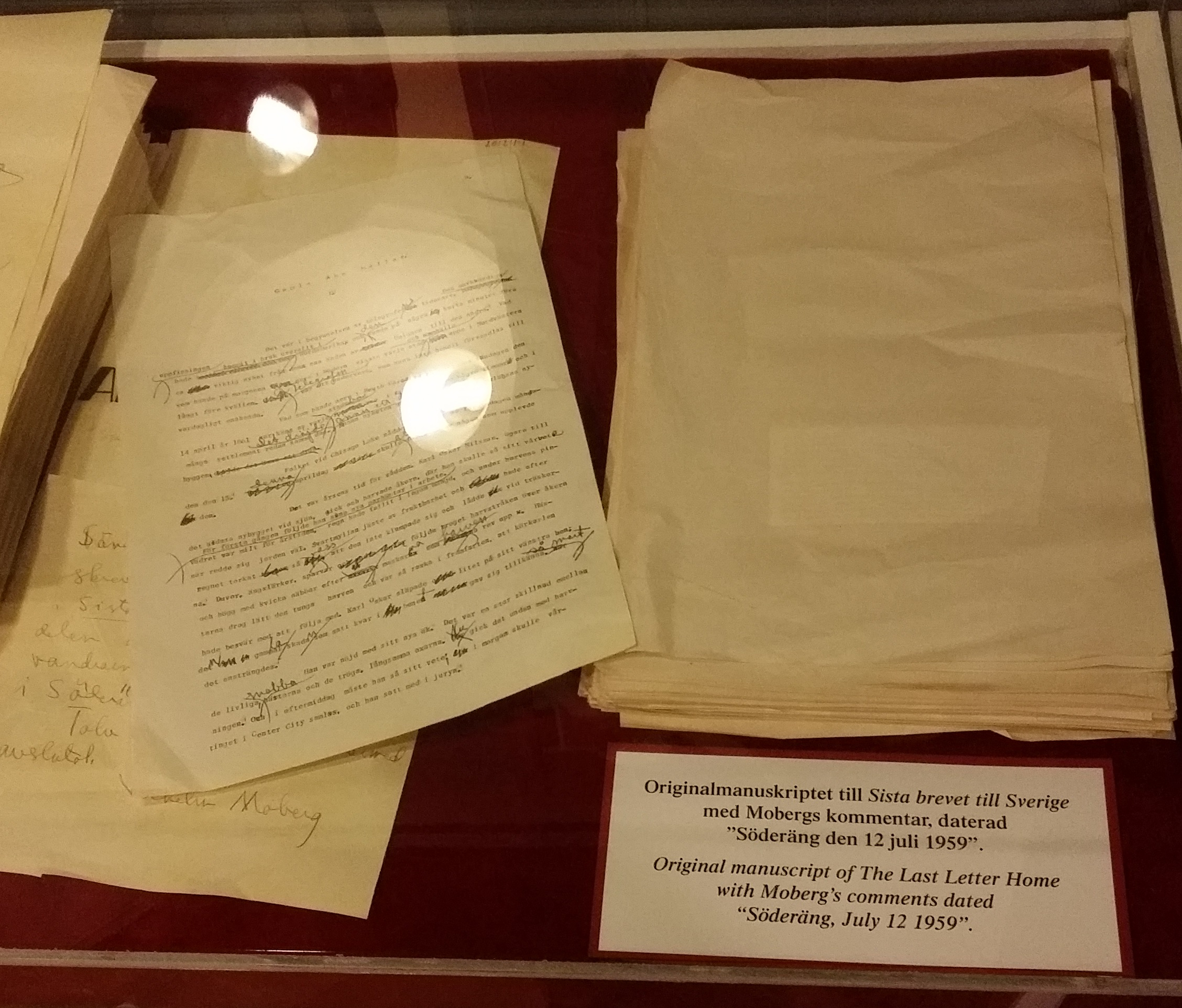 Originalmanuskriptet till "Sista brevet till Sverige" (1959).